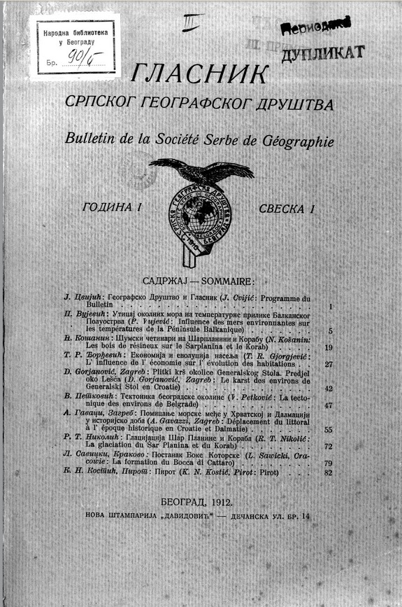 Prvo izdanje Glasnika geografskog drustva